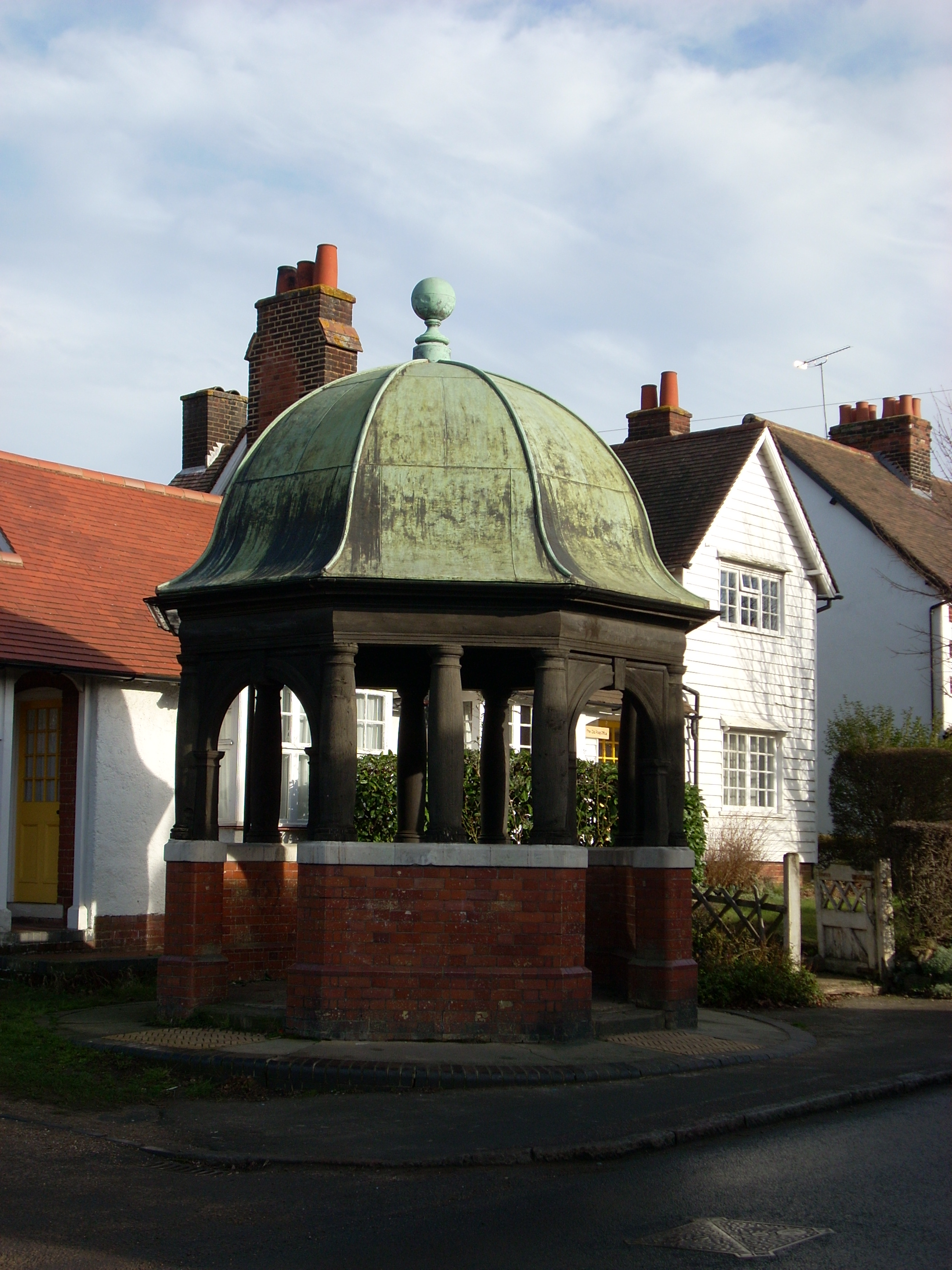 Elsenham, Essex, England